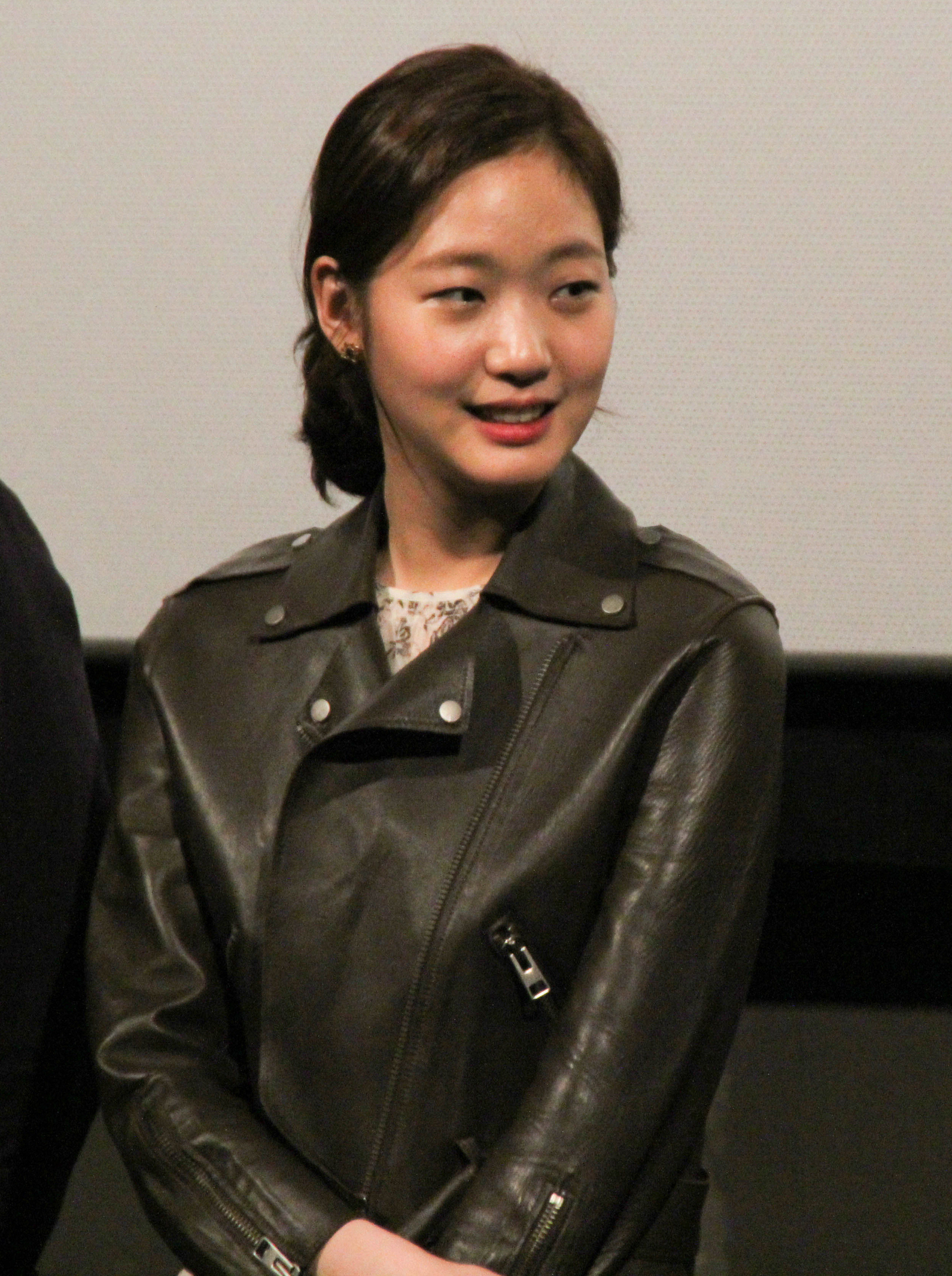 2014년 3월 22일 롯데시네마 청량리에서 열린 영화 《몬스터》 무대인사에 참석한 김고은.